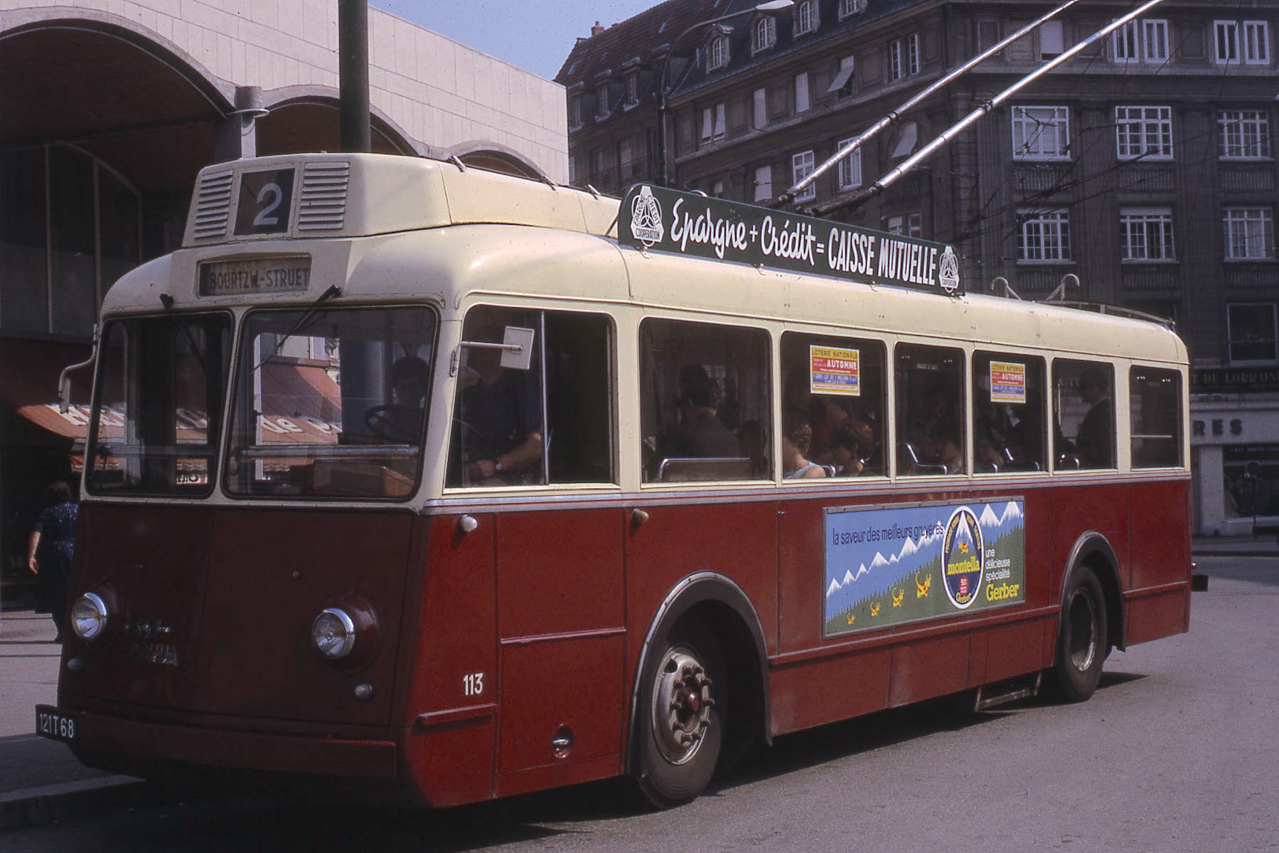 Trolleybus de la TCM (Transport en commun de Mulhouse, devenue Soléa), ligne 2, stationné Porte Jeune à Mulhouse, 1966